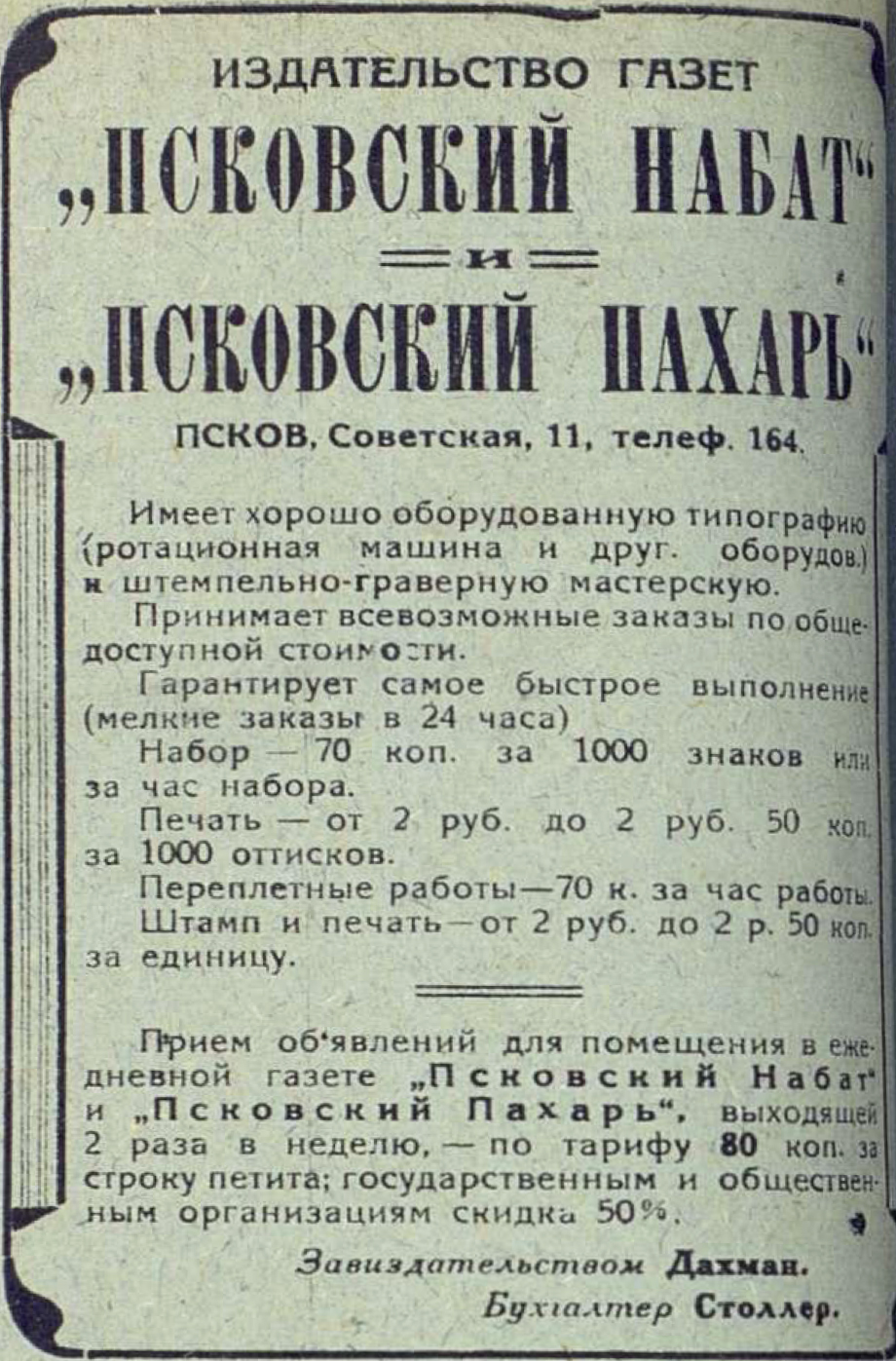 Реклама издательства газет Псковский набат и Псковский пахарь, 1930 год.